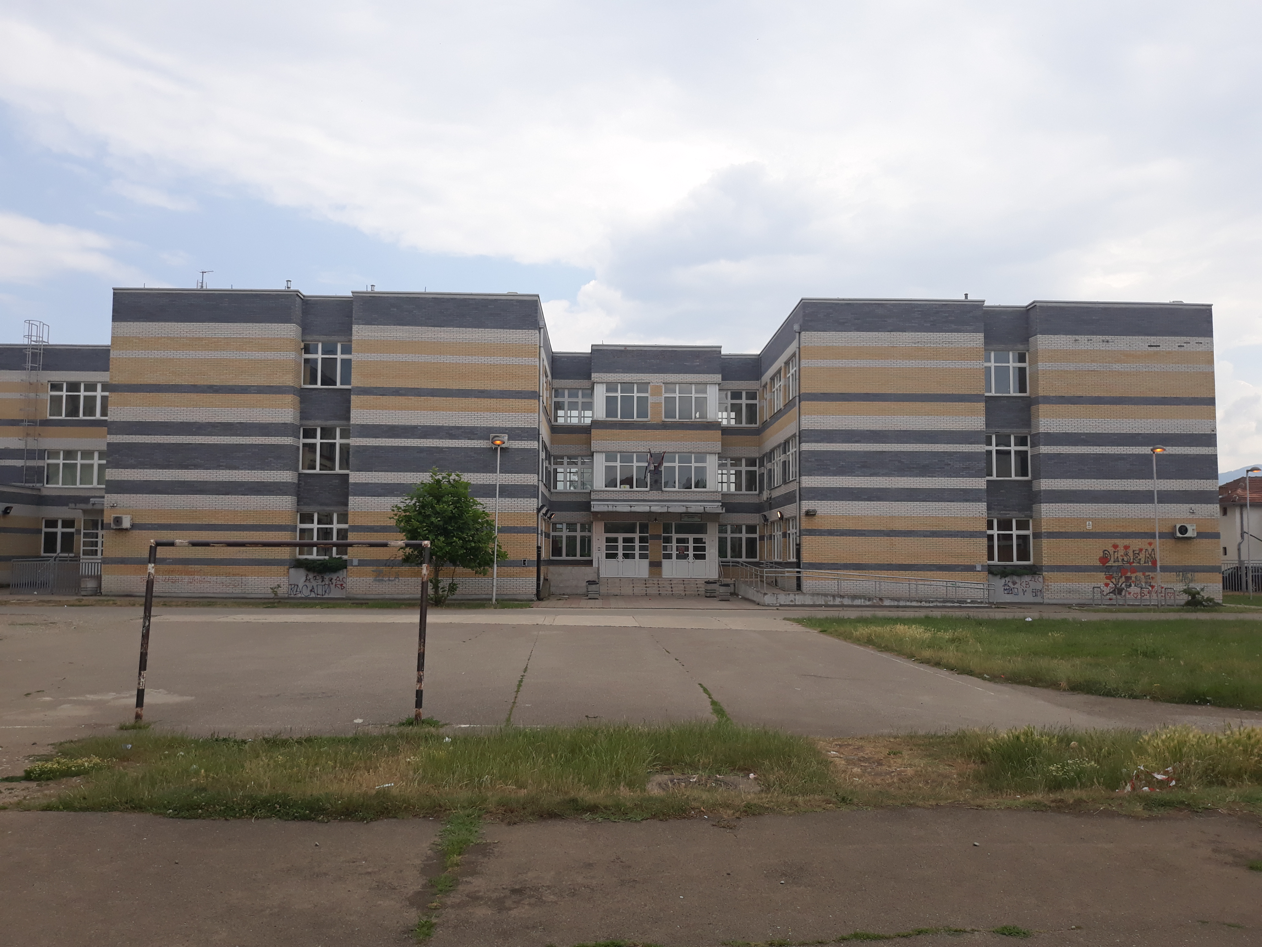 Медицинска школа у Краљеву